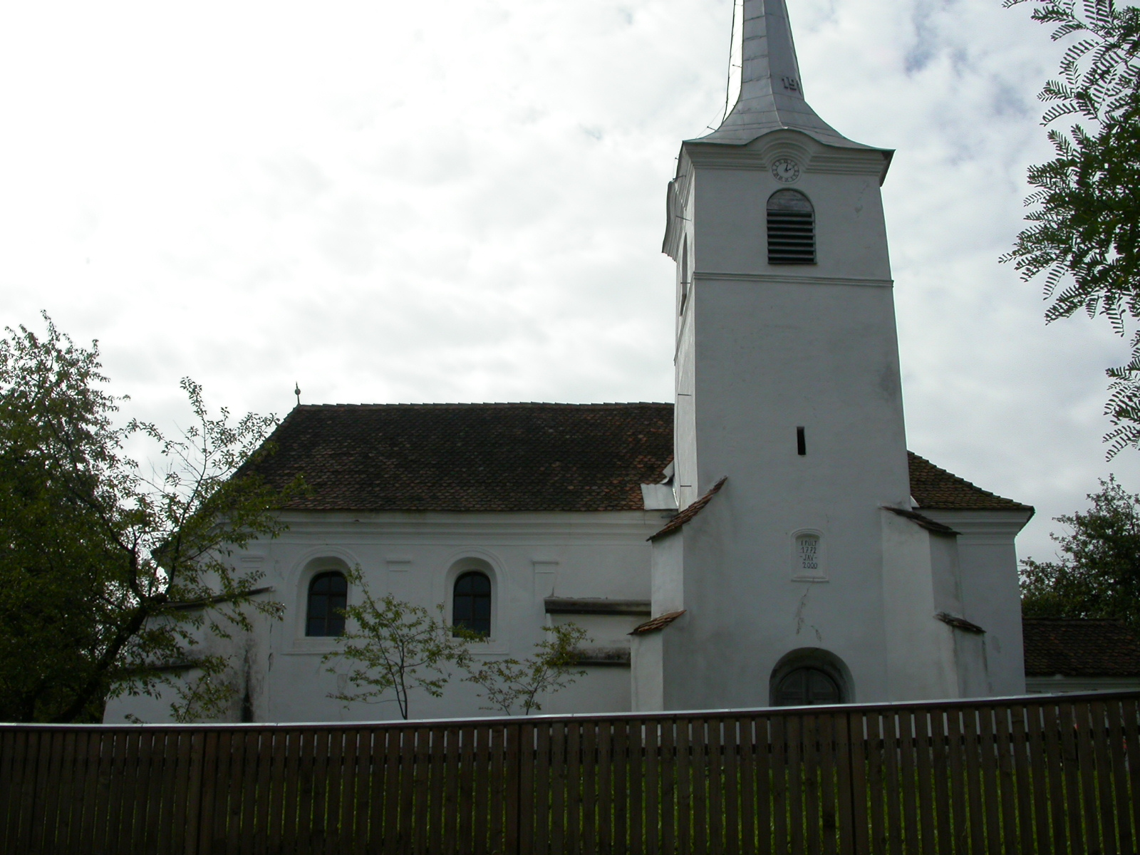 Biserica reformată, 1784,1792